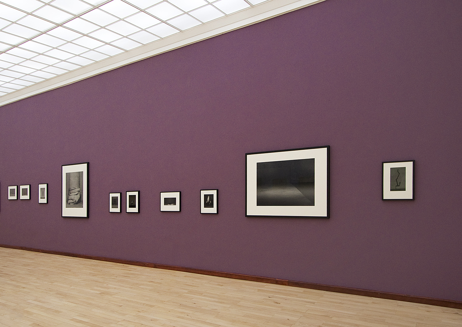 výstava